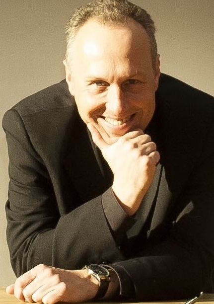 Prof. Dr. Andreas Otterbach